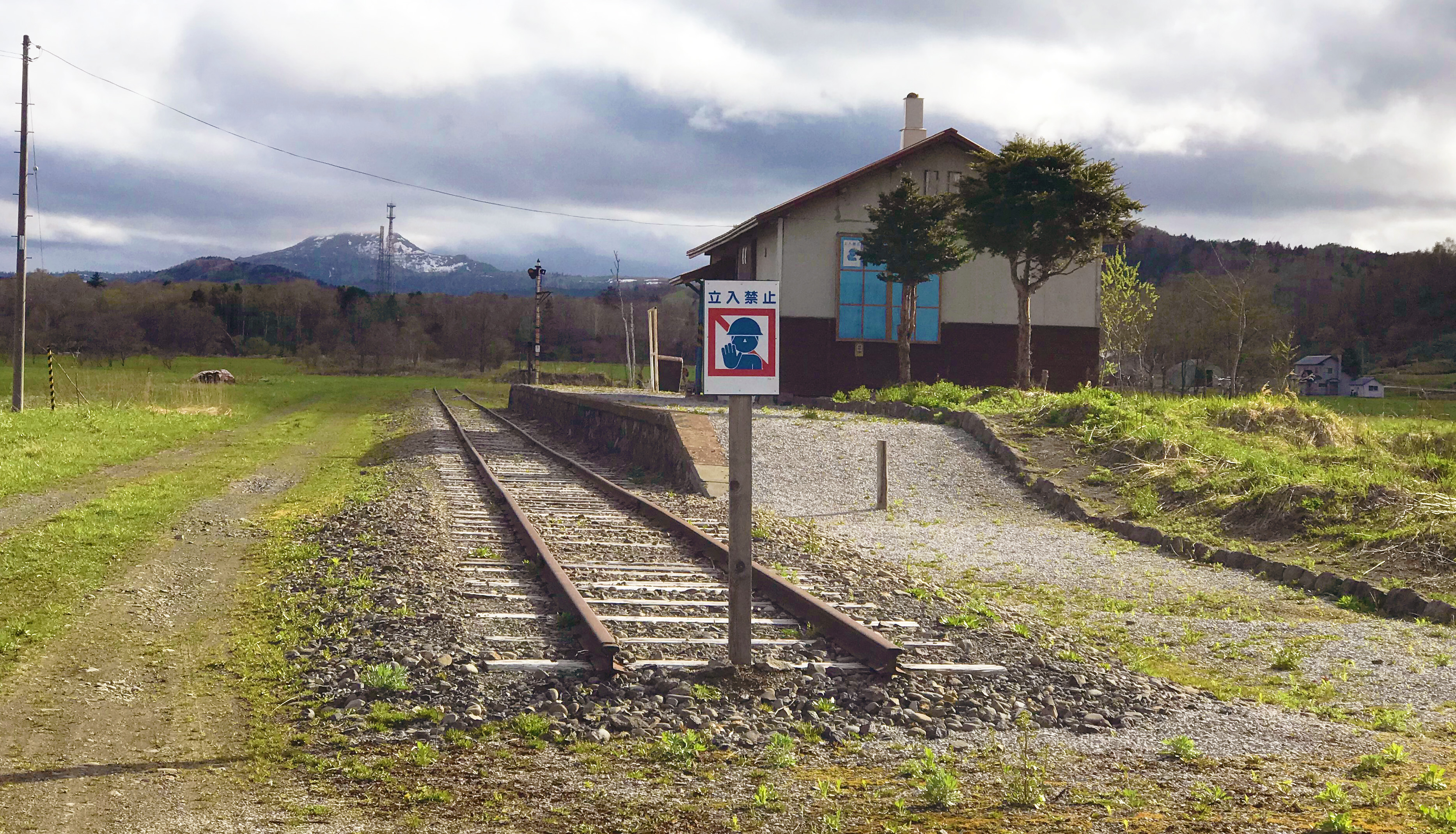 松音知駅跡201905時点